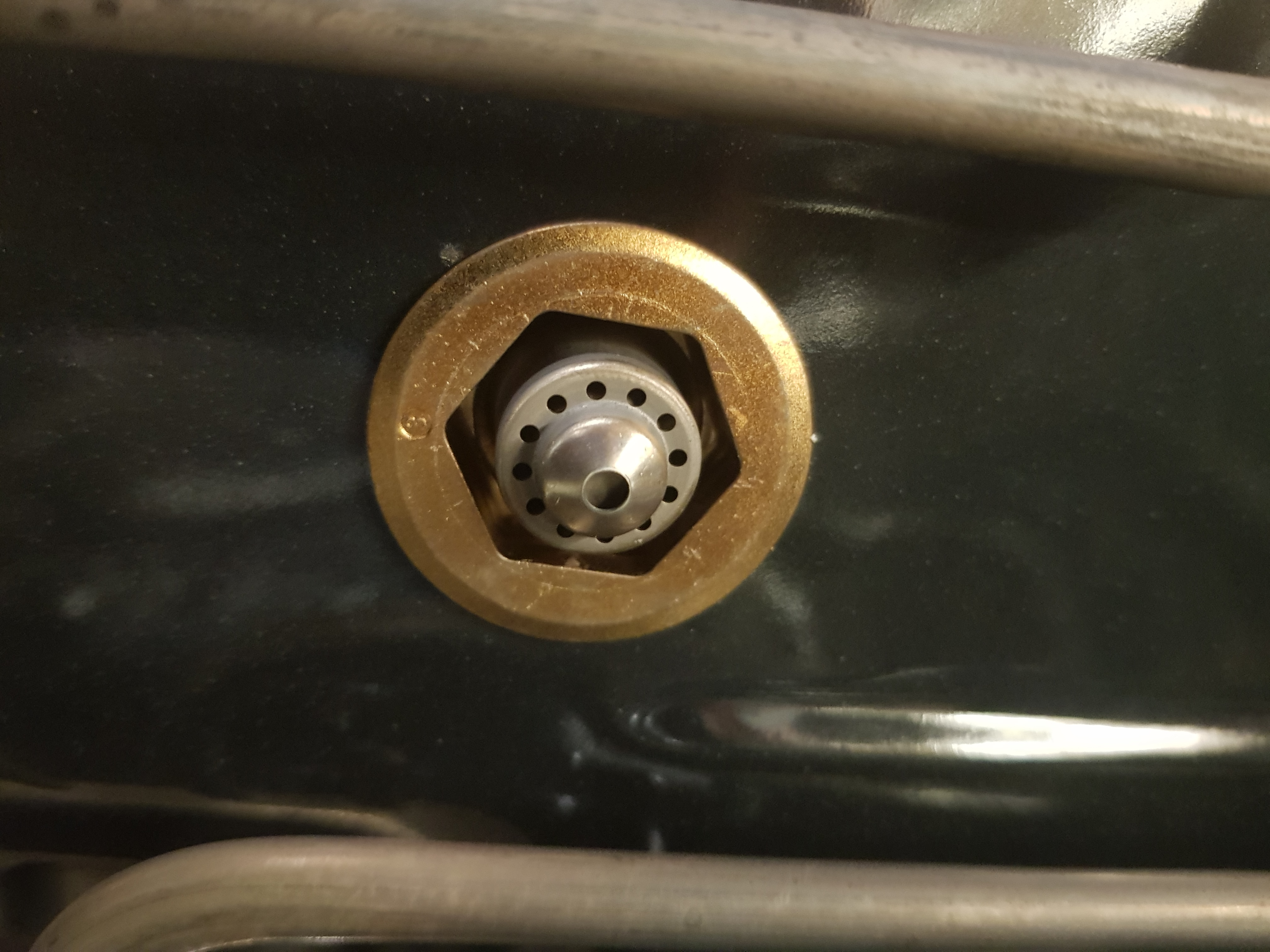 Lambdasonde in einem Backofen (Siemens HN678G4S6) der BSH Hausgeräte GmbH.